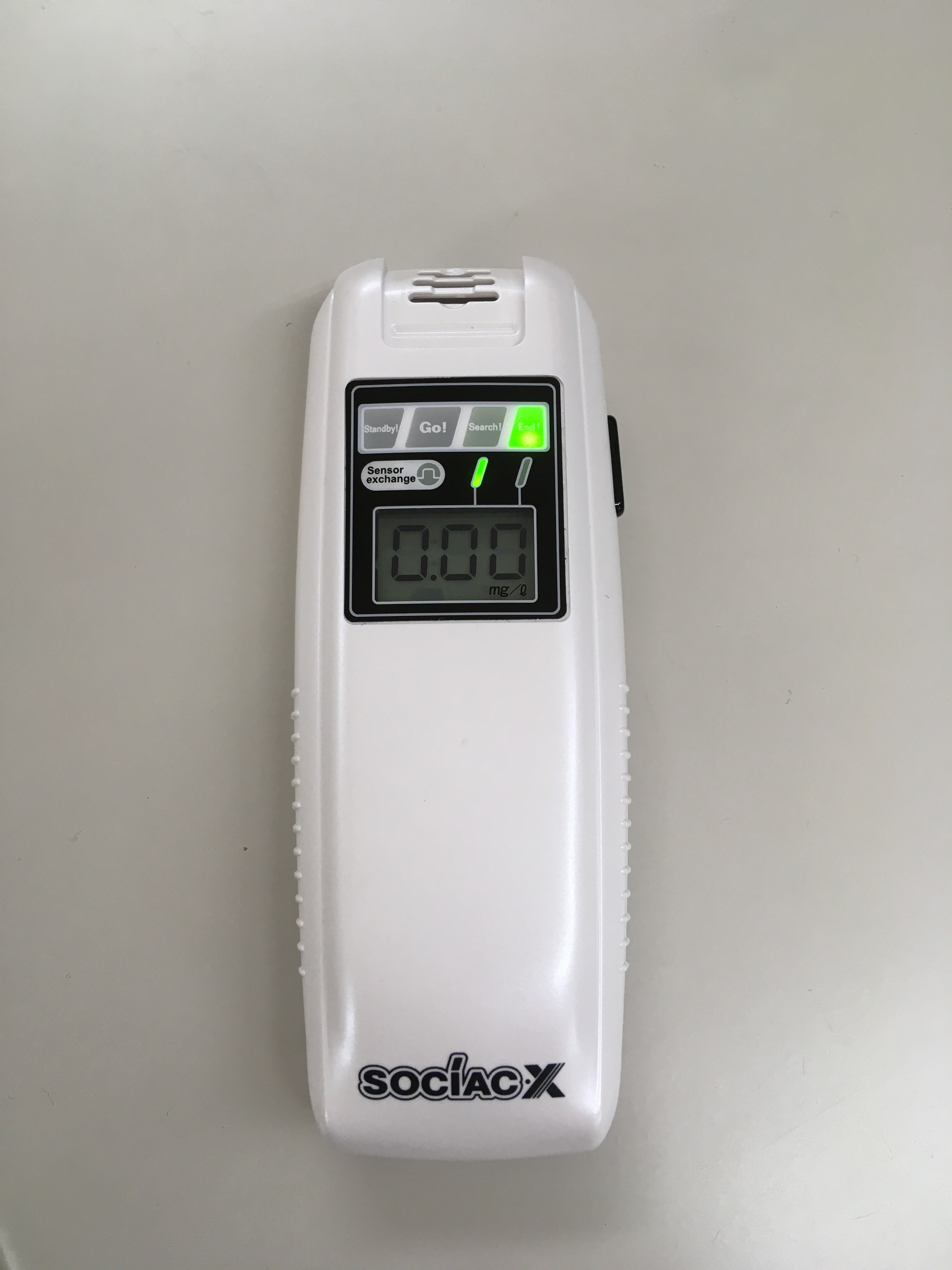 2019/1/22撮影、出勤前の自宅チェックにハンディタイプのアルコール検知器を使用。